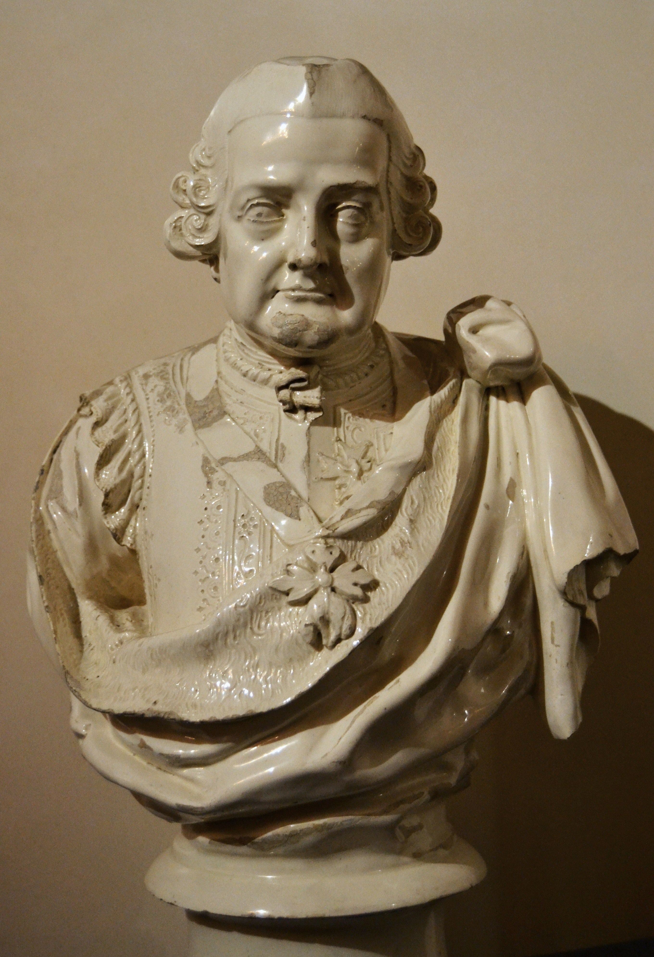 Bust del Comte d'Aranda, pisa de l'Alcora, segle XVIII, avantcambra del palau del marqués de Dosaigües.